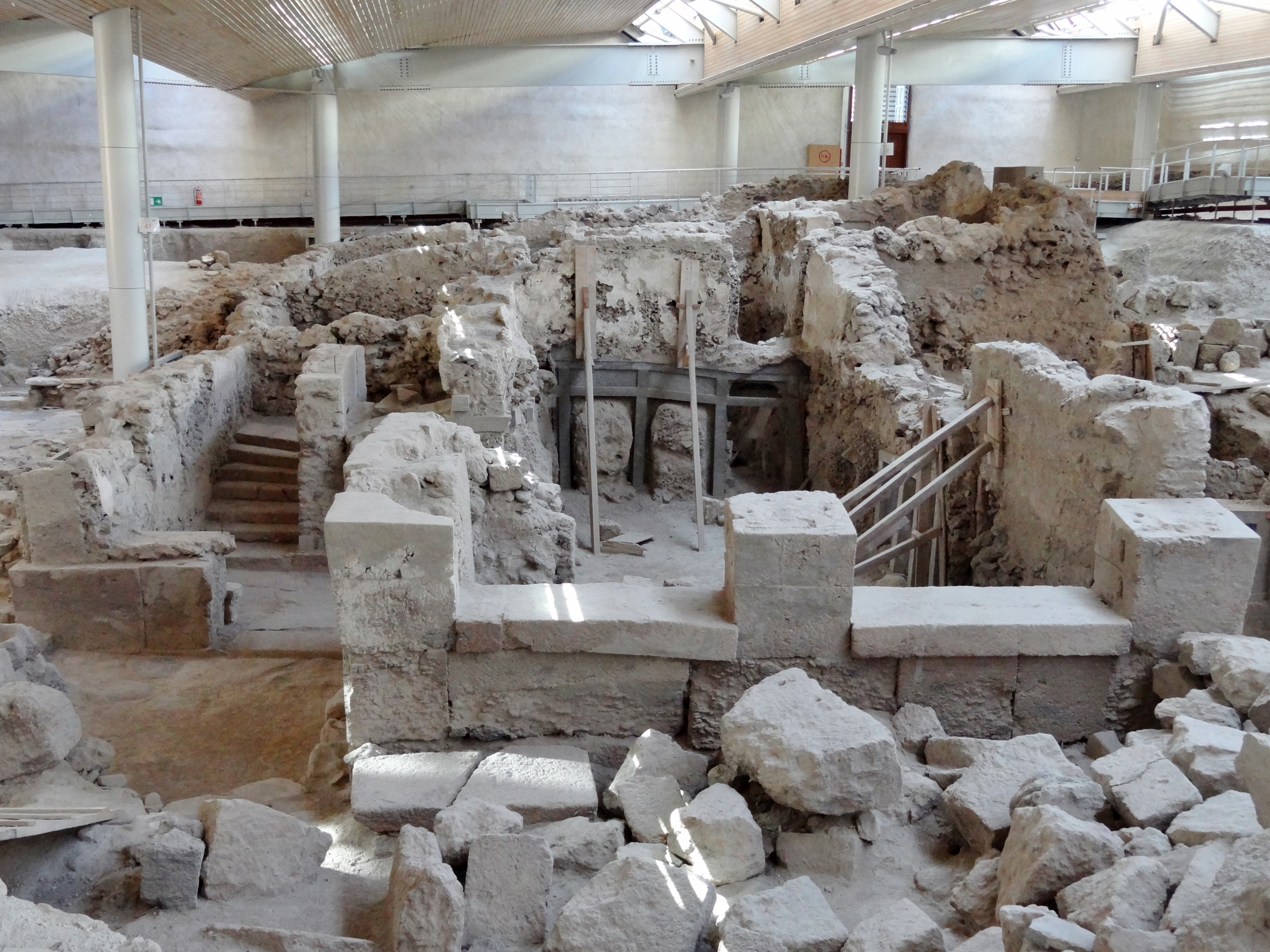 Ausgrabungsstätte von Akrotiri auf Santorin, Kykladen, Griechenland